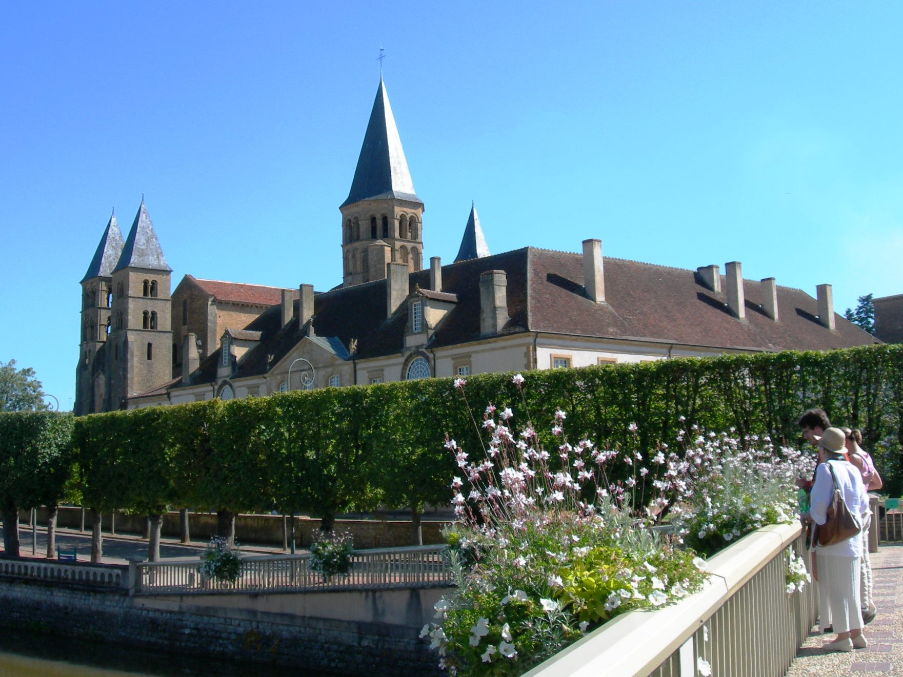 Paray-le-Monial, le monastere)